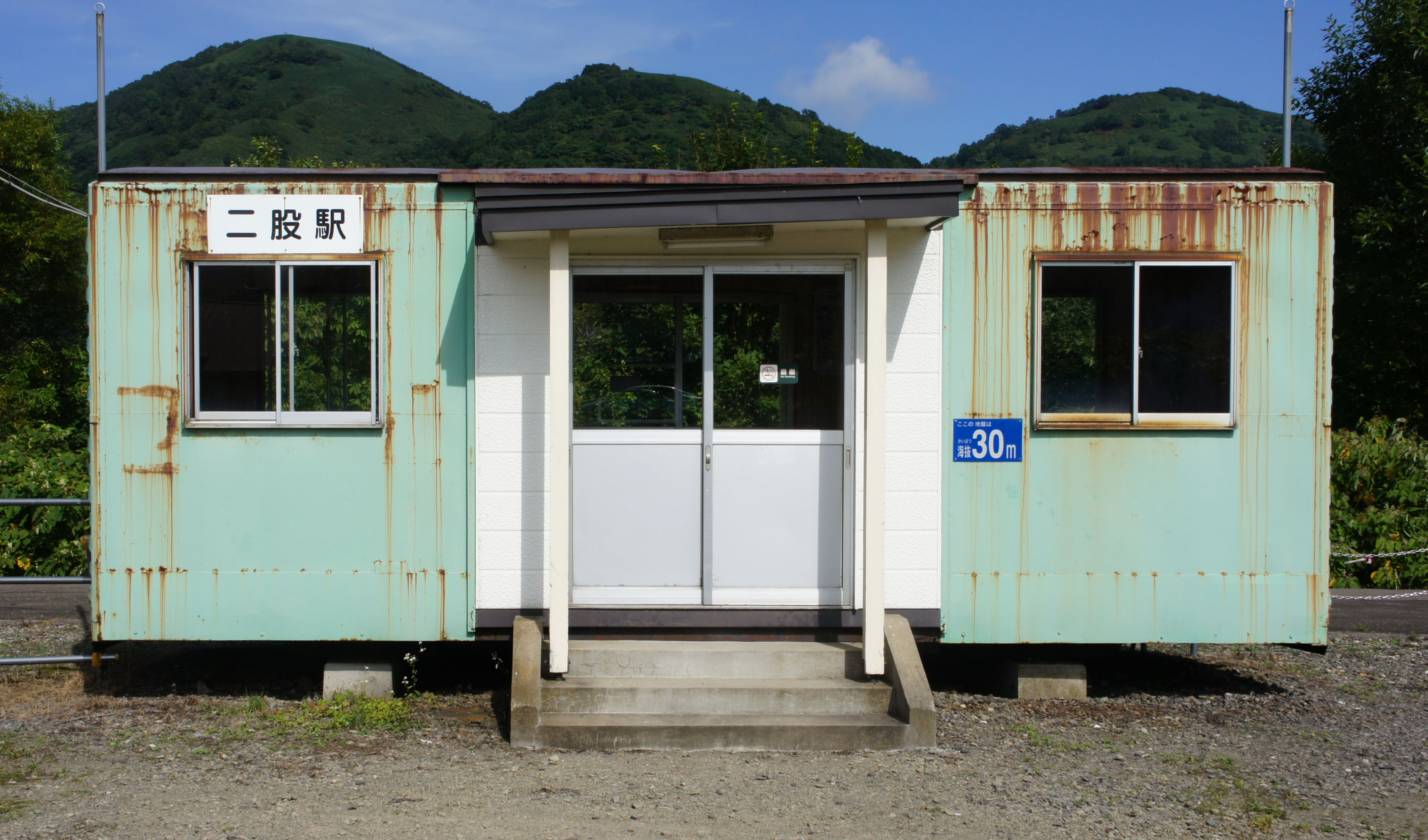 JR函館本線・二股駅の駅舎 Sony NEX-3